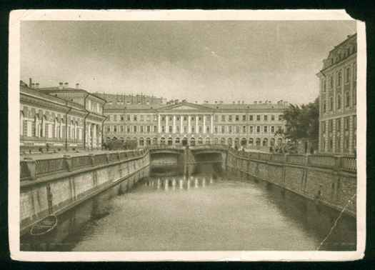 Открытка с видом Тройного моста через реку Мойку и канал Грибоедова в Санкт-Петербурге. Театральный и Пешеходный мосты